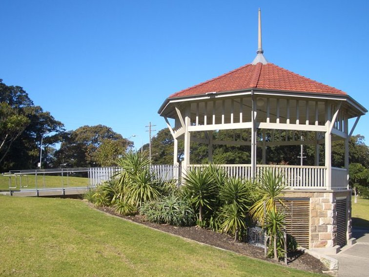 Moore Park Rotunda, Sydney